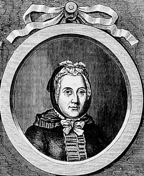 Teresa Ossolińska (1717-1776)